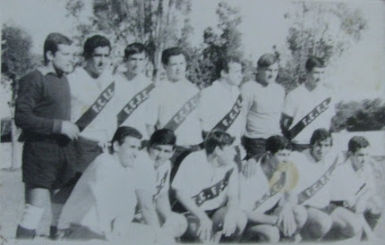 Equipo F.C.F.C.con su portero Eduardo Pierri